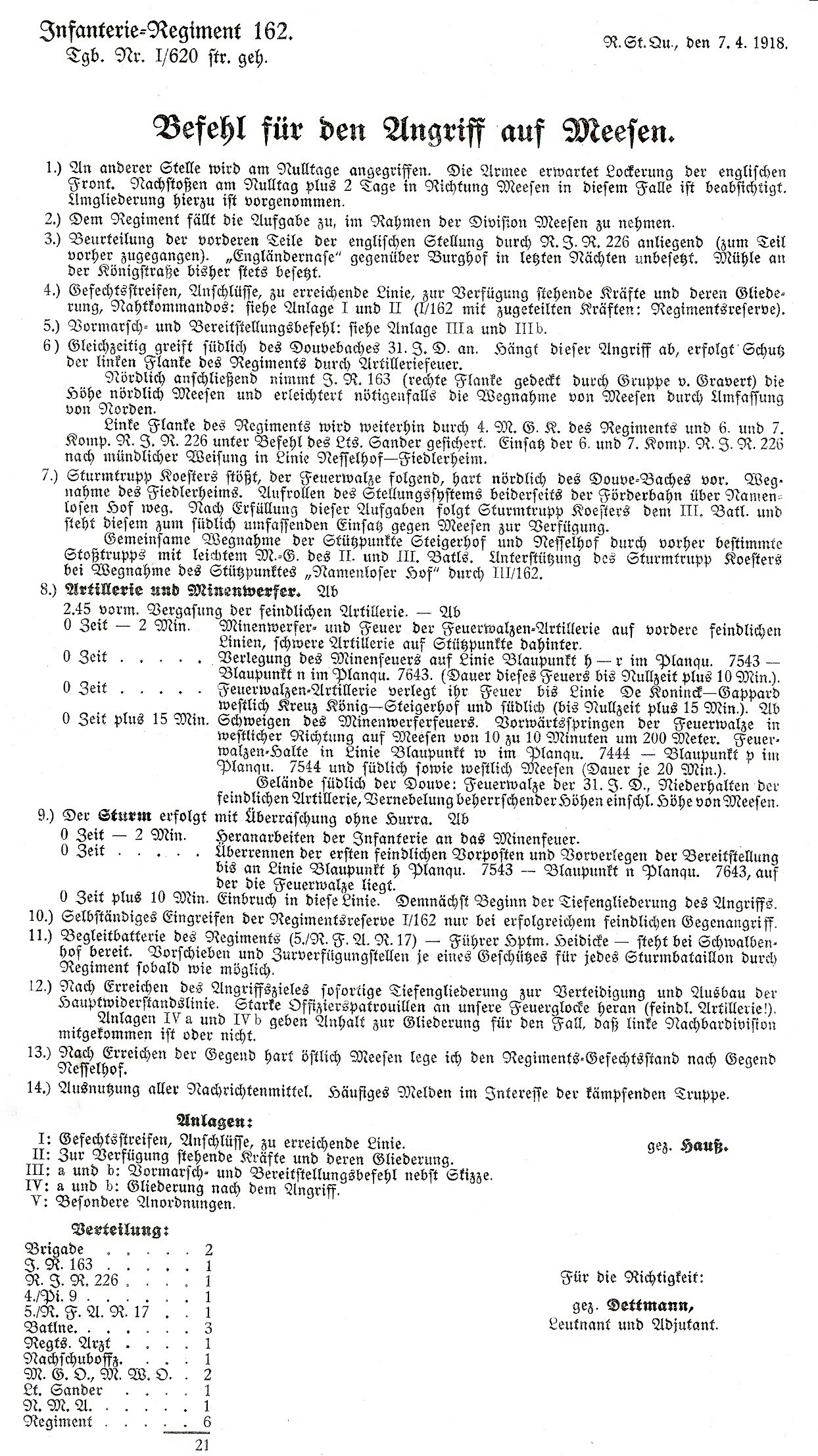 Befehl für den Angriff auf Meesen. Anmerkungen:Regiment wurde mit Versailler Vertrag 1919 aufgelöst